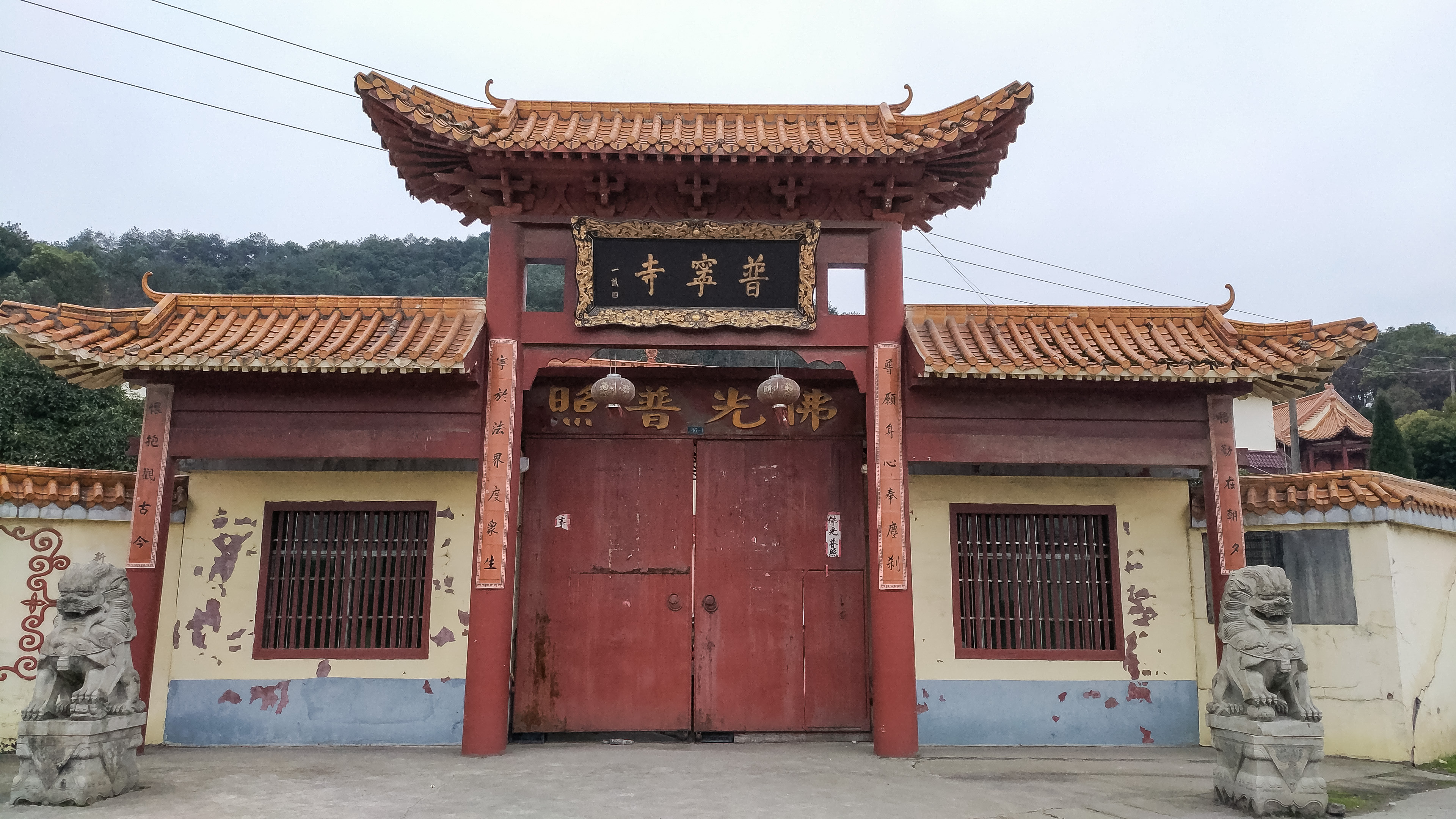 玉山普宁寺